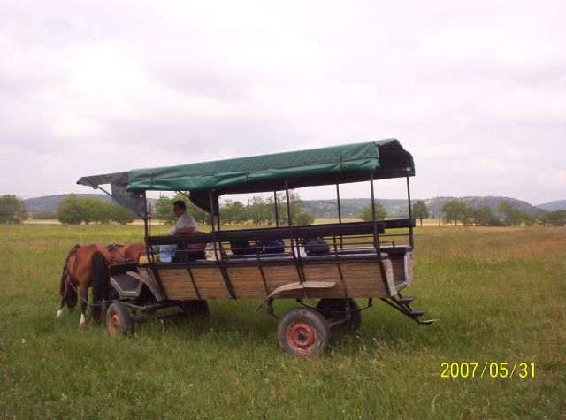 Csékvár, lovasszekér